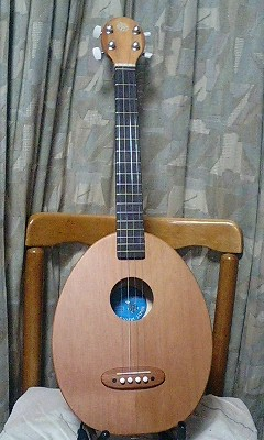 一五一会・奏生(かない)。2006年、自宅にて。